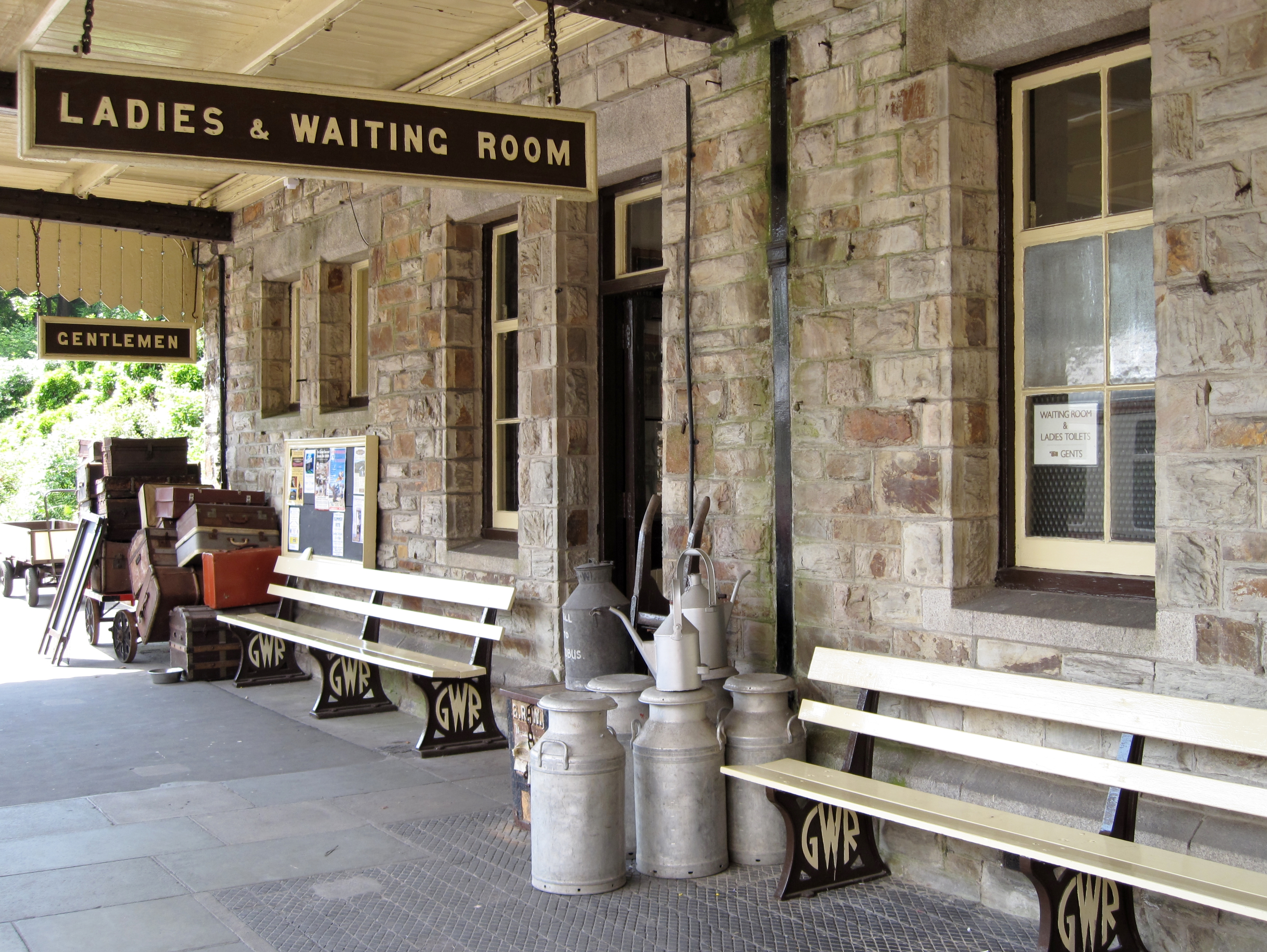 Bahnsteig des Bahnhofs Bodmin General in Bodmin, Cornwall, Großbritannien